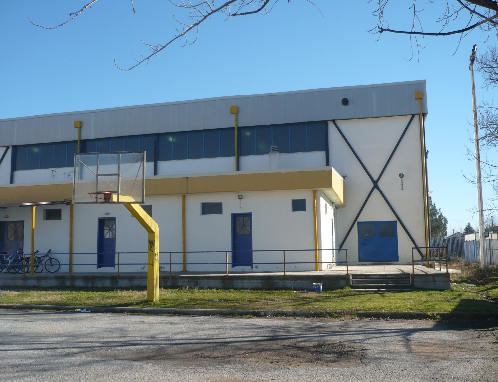 Γήπεδο μπάσκετ